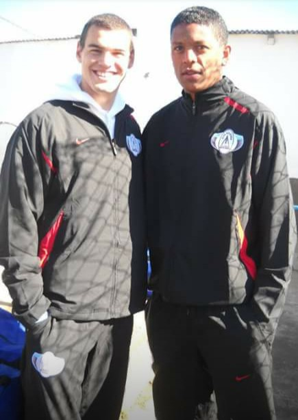 Martin Gimenez- Atlas